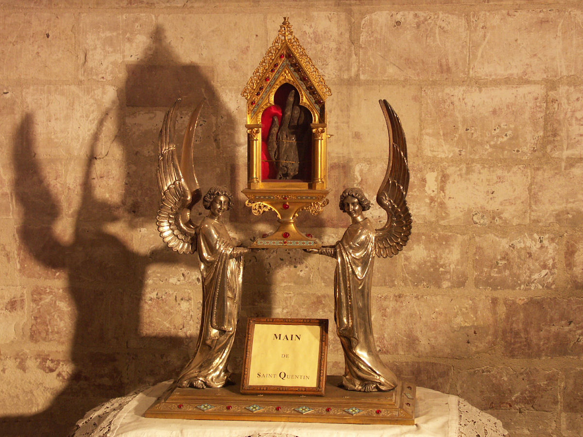 Basilique de Saint-Quentin (Aisne, France) - Hand of Saint Quentin